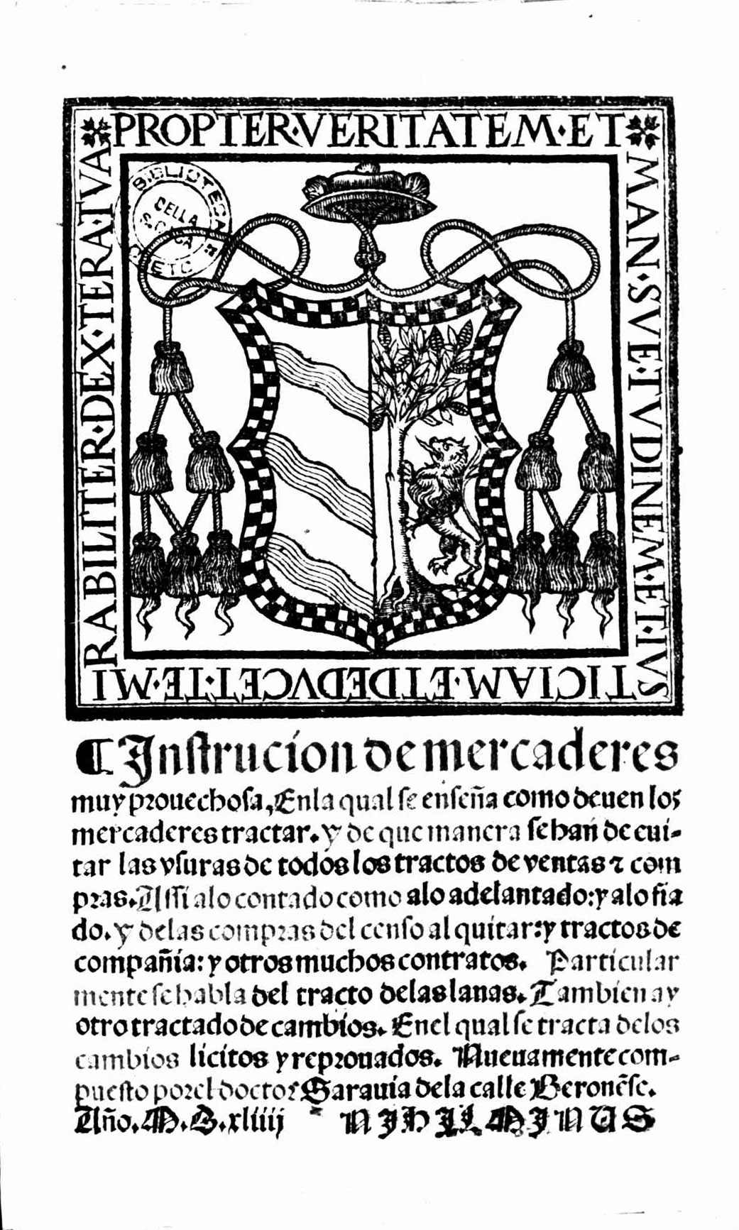 Frontespizio